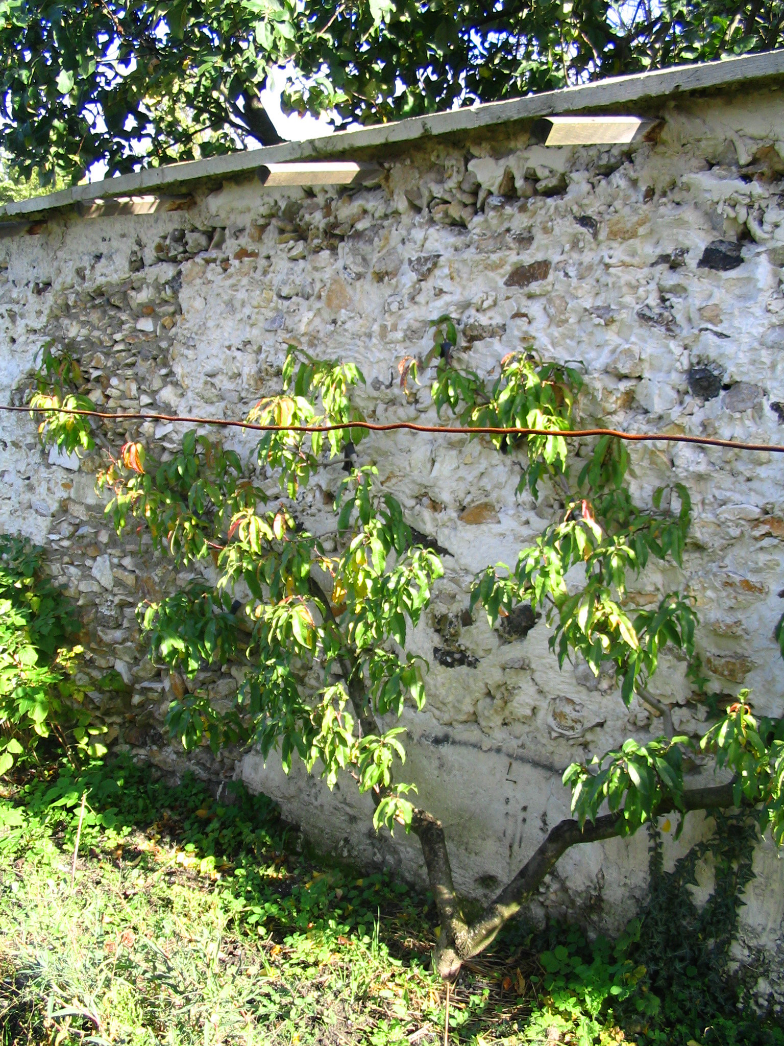 Murs à pêches à Montreuil - France Auteur/author: P.Charpiat - 2006